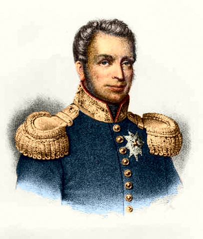 Willem I van Nederland (oorspronkelijk B/W, eigen inkleuring)